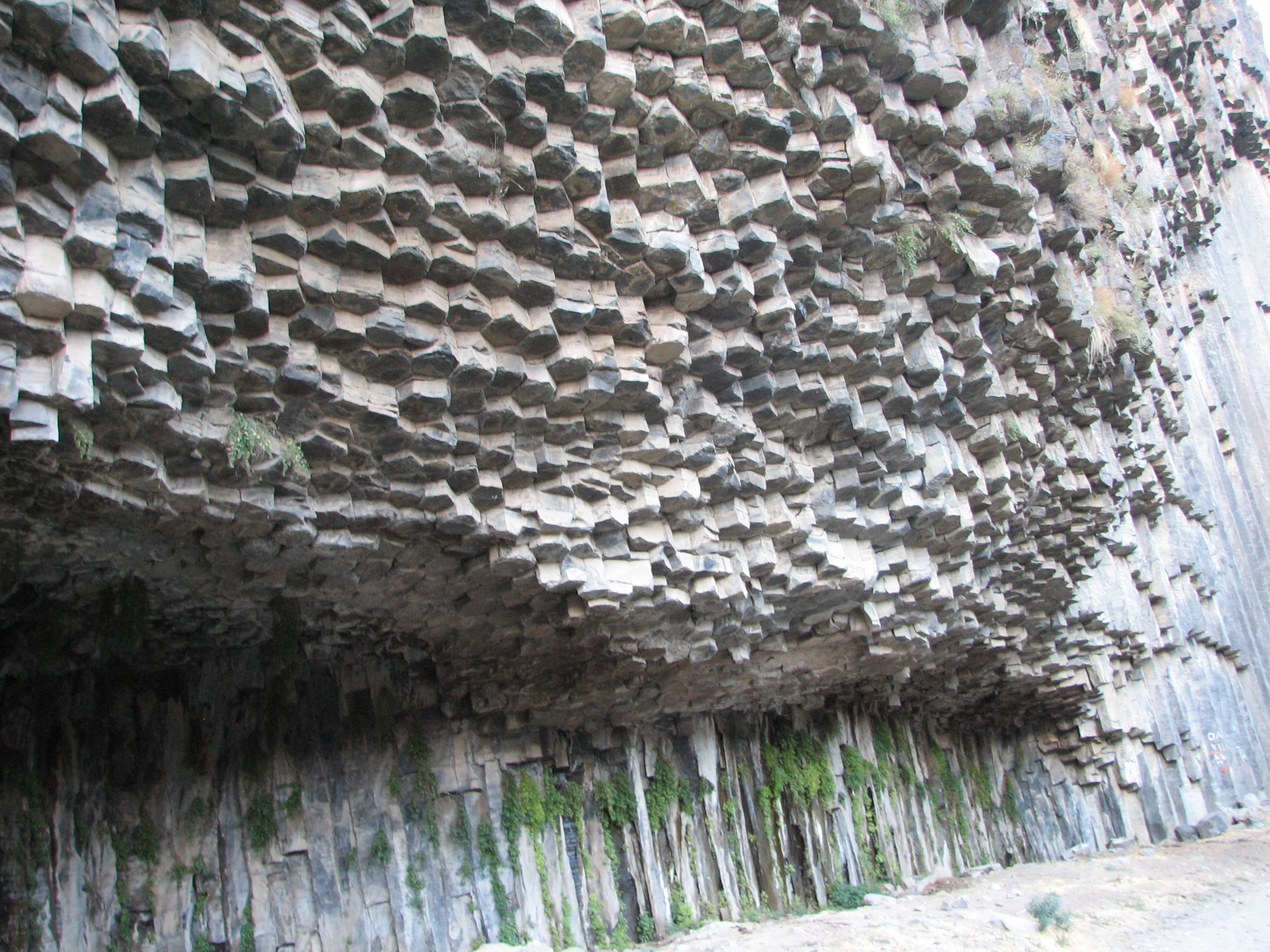 Garni Gorge is situated 23 km east of Yerevan, Armenia קניון גרני נמצא מזרחית לירוואן בירת ארמניה. התופעה המייחדת את הקניון הם עמודי בזלת בצורת משושים